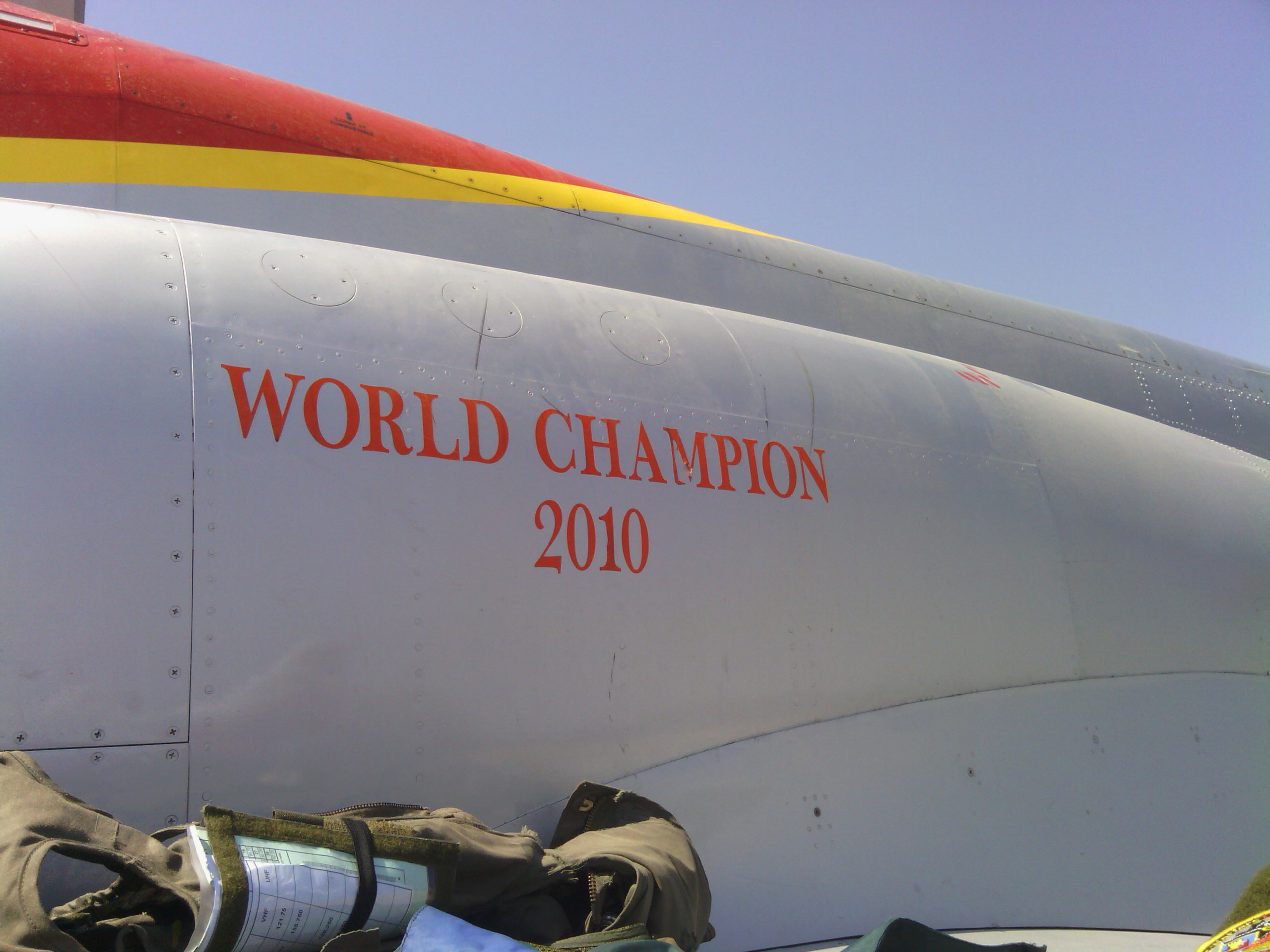 Pegatina de campeones del mundo del año 2010